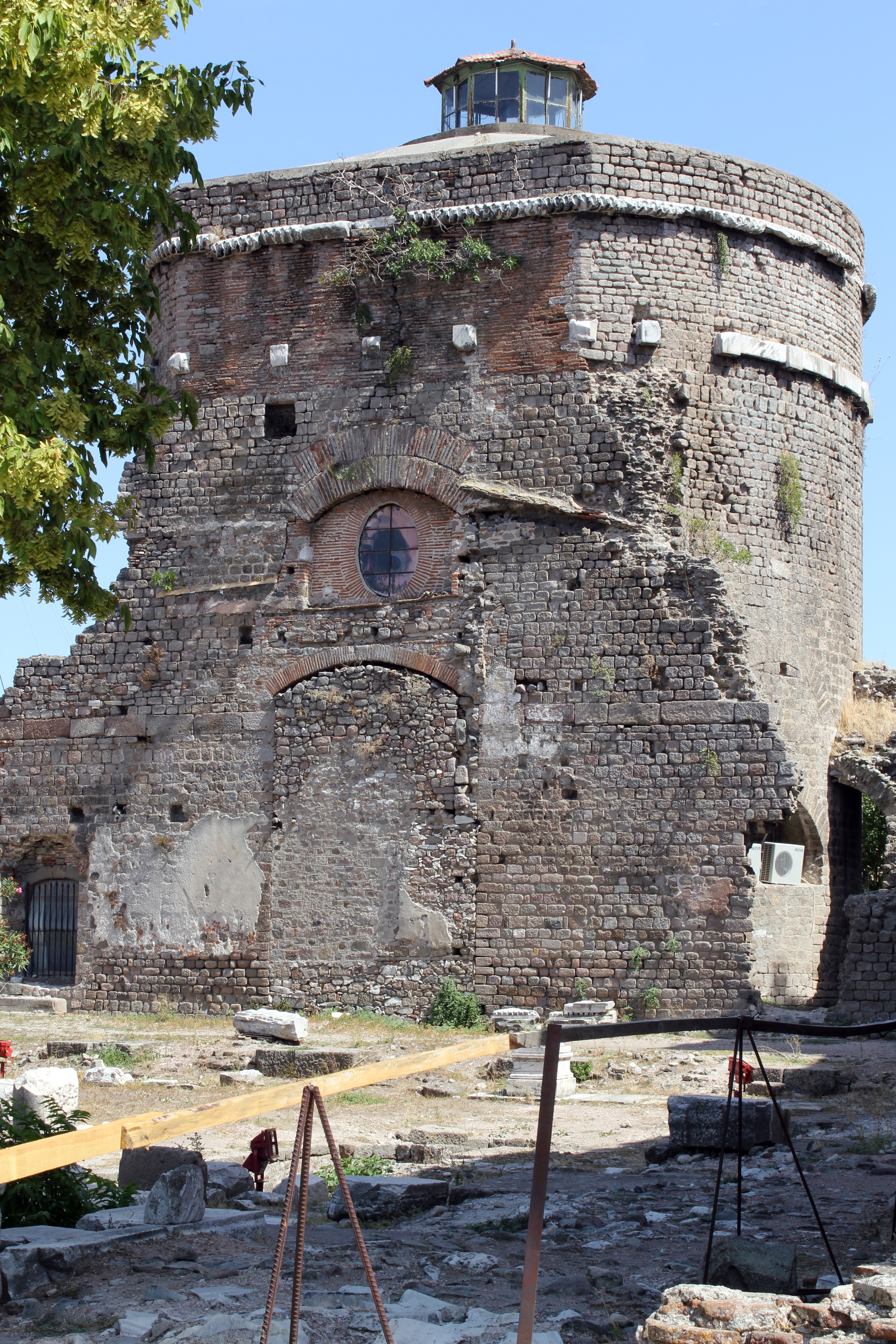 Rote Halle, Pergamon, Westtürkei, Nordturm